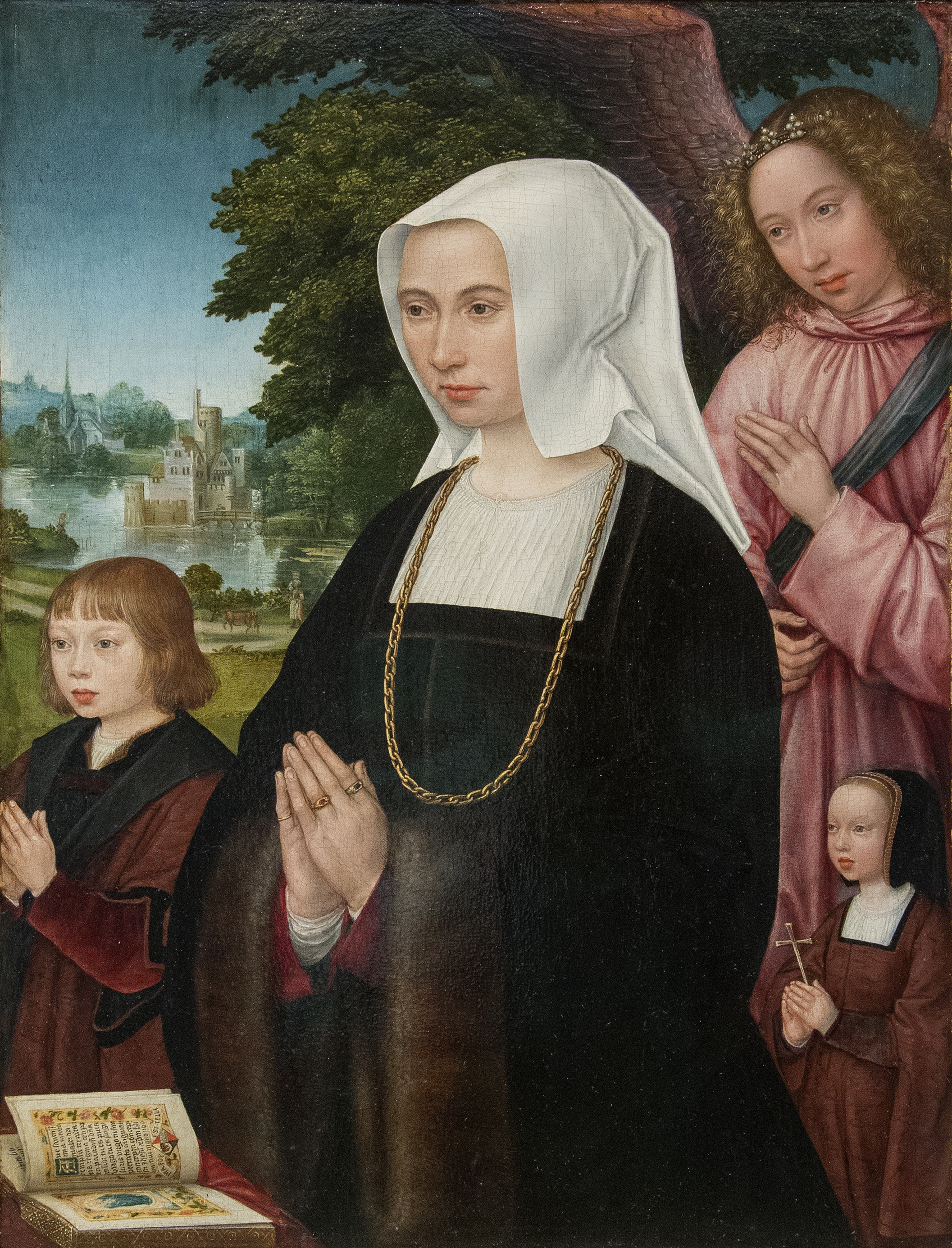 Eigen creatie van twee schilderijen - Gerard Horenbout (ca.1465-1540of1541) Portretten van Lieven van Pottelsberghe, Livina van Steelant en hun kinderen MSK Gent This is a file created at the museum: Museum of Fine Arts in Ghent Wikidata has entry Q26250180 with data related to this item.